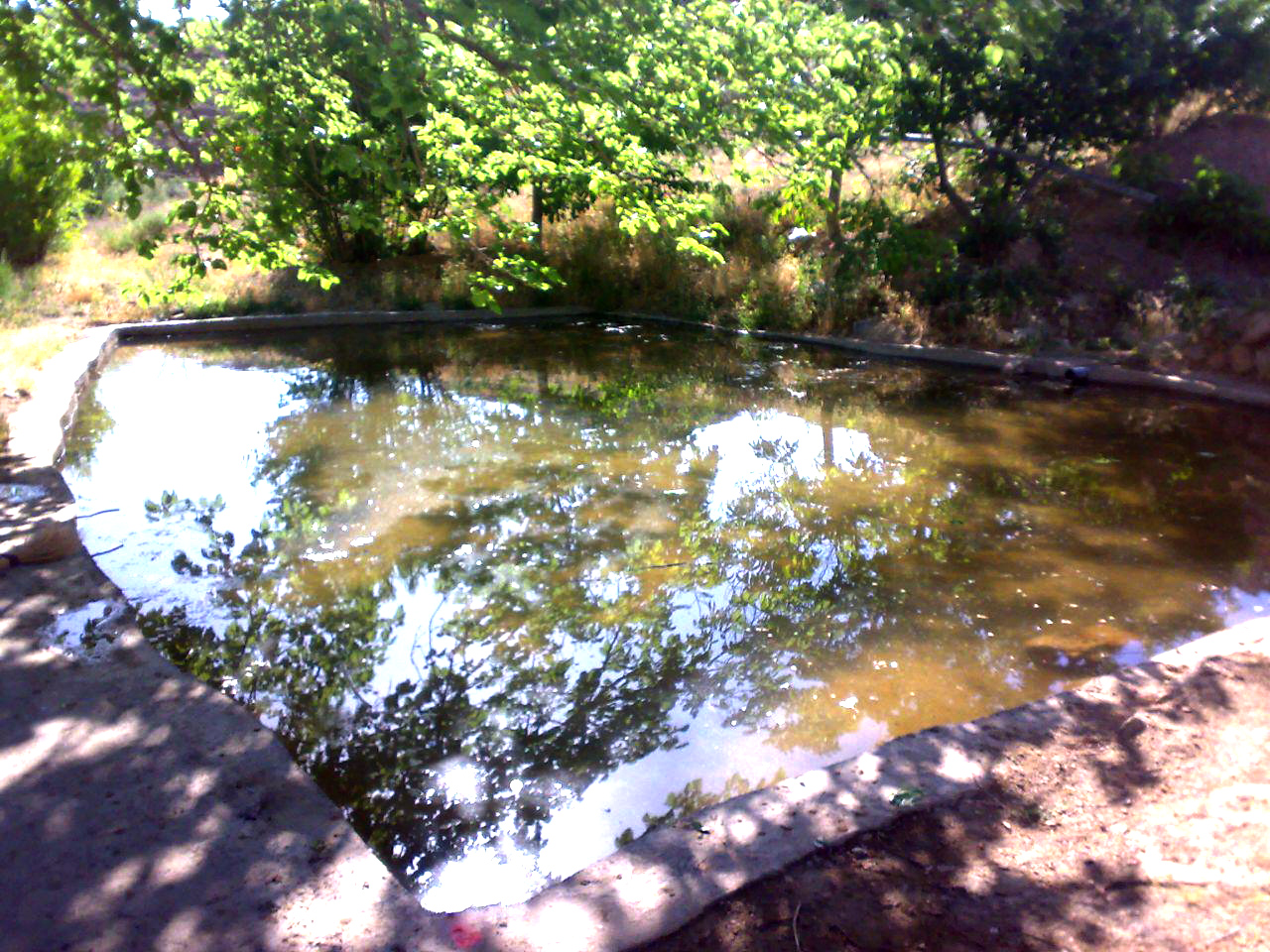 س